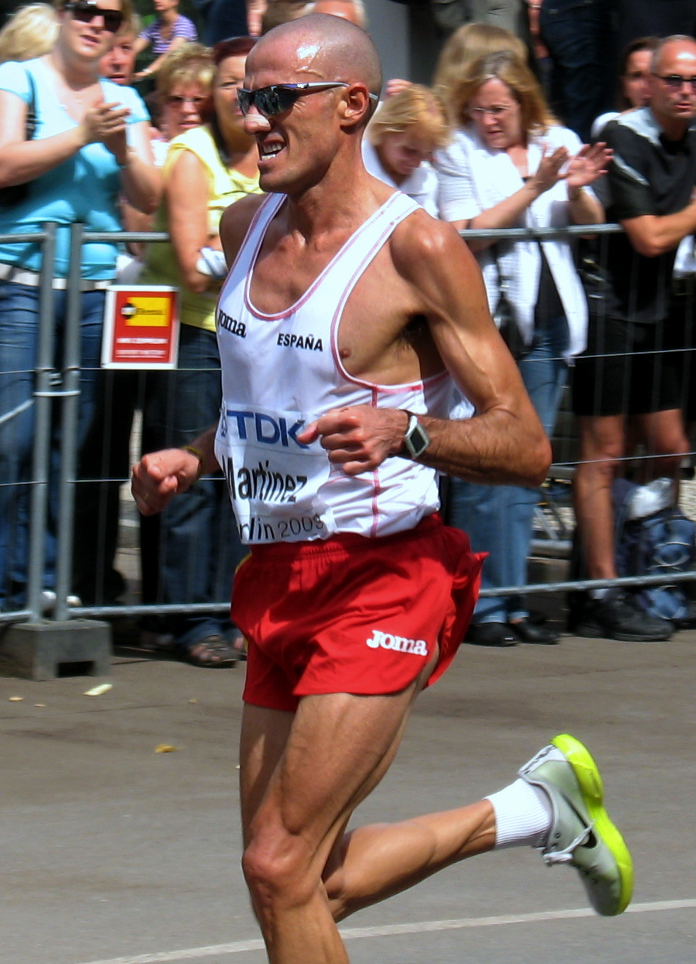 José Manuel Martínez, 22.08.2009